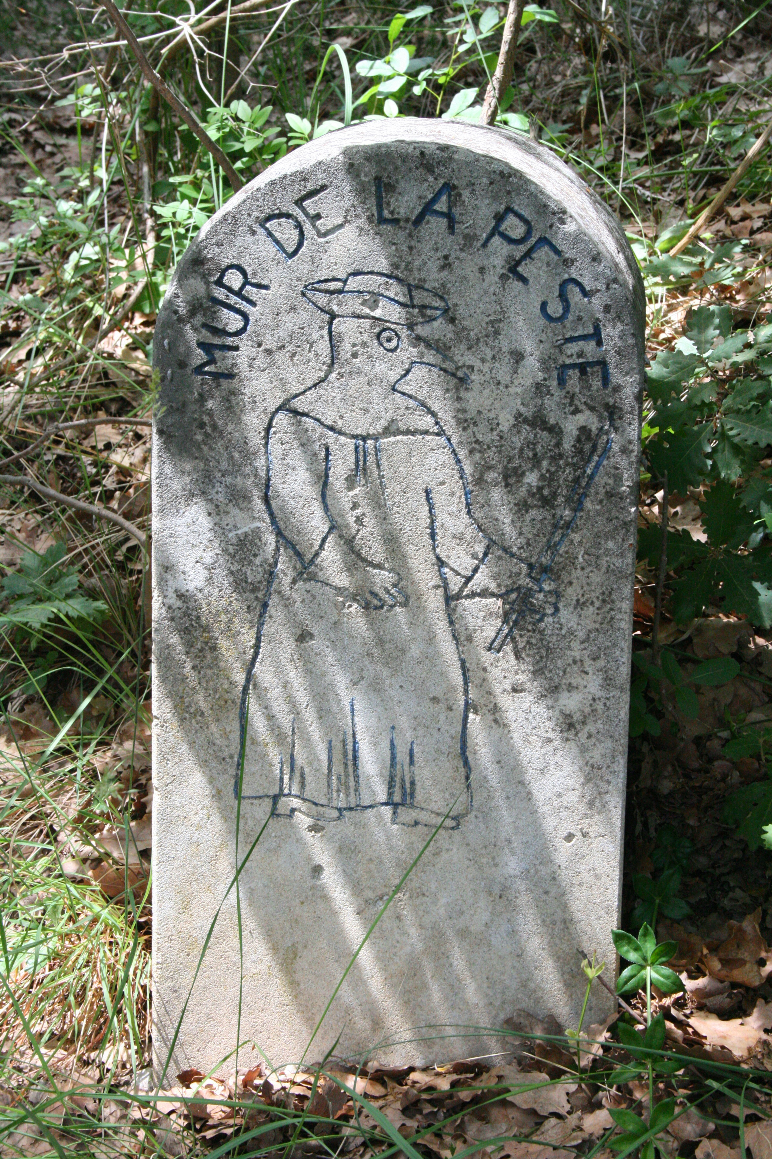 Mur de la Peste (1721). Cabrières-d'Avignon, département du Vaucluse (France). Borne de signalisation contemporaine